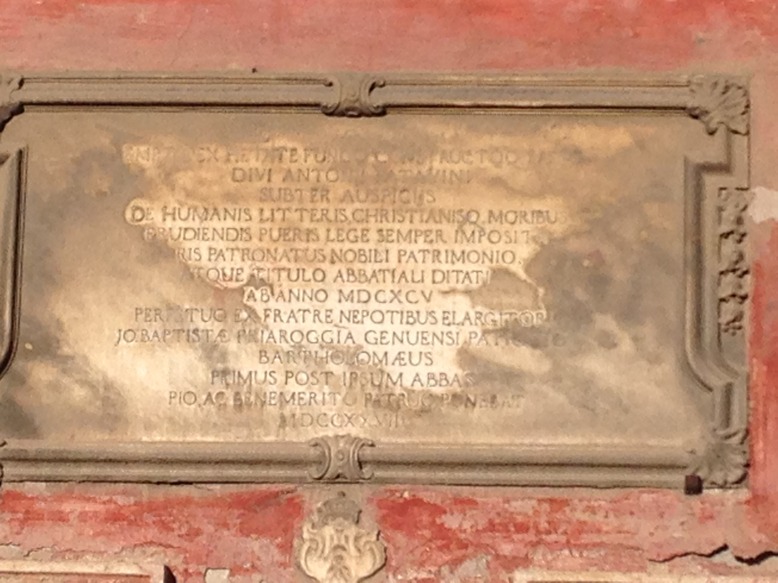 Ce Marble atteste que l'abbaye existait comme telle depuis le 1695.